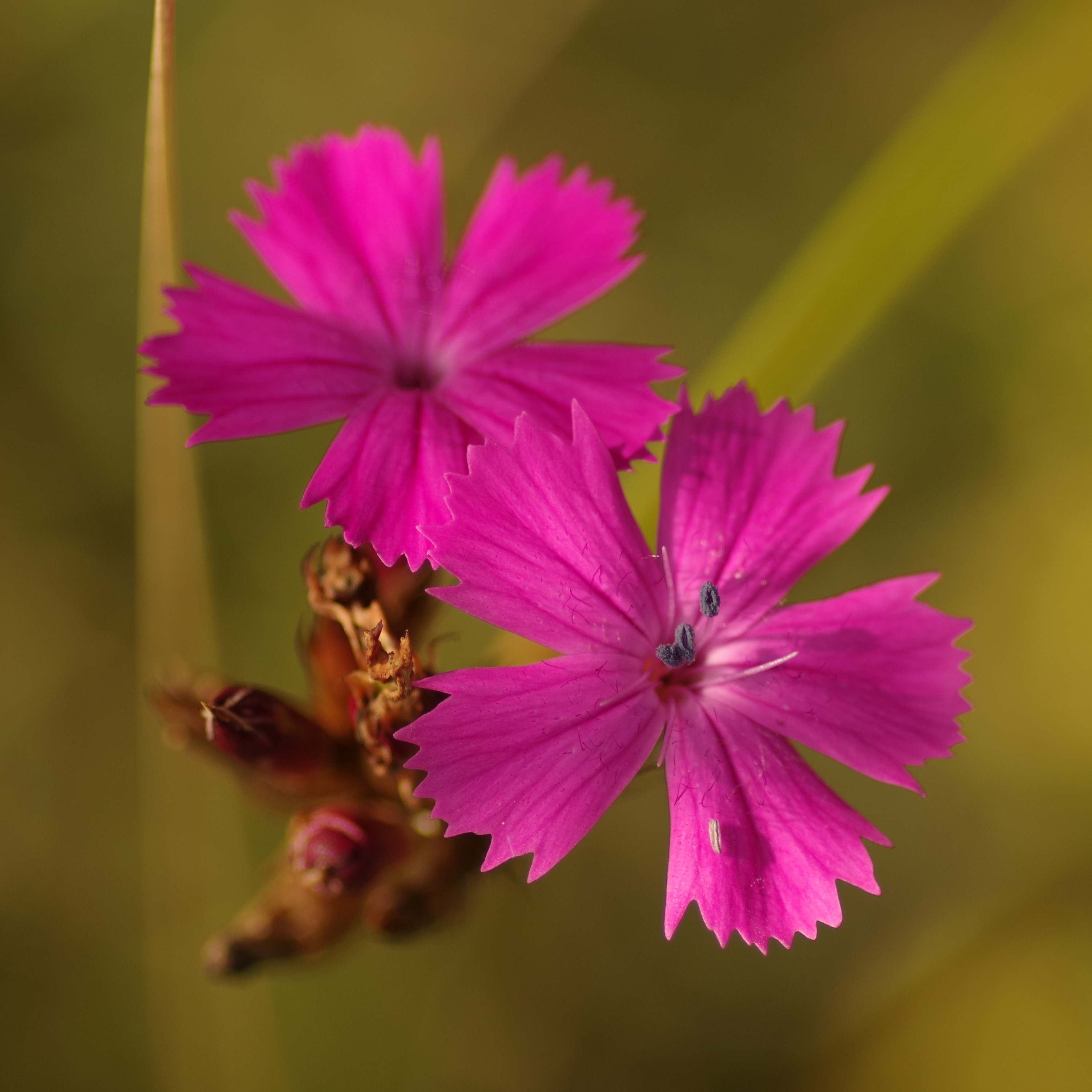 Fleurs d'Œillet des Chartreux (Dianthus carthusianorum).